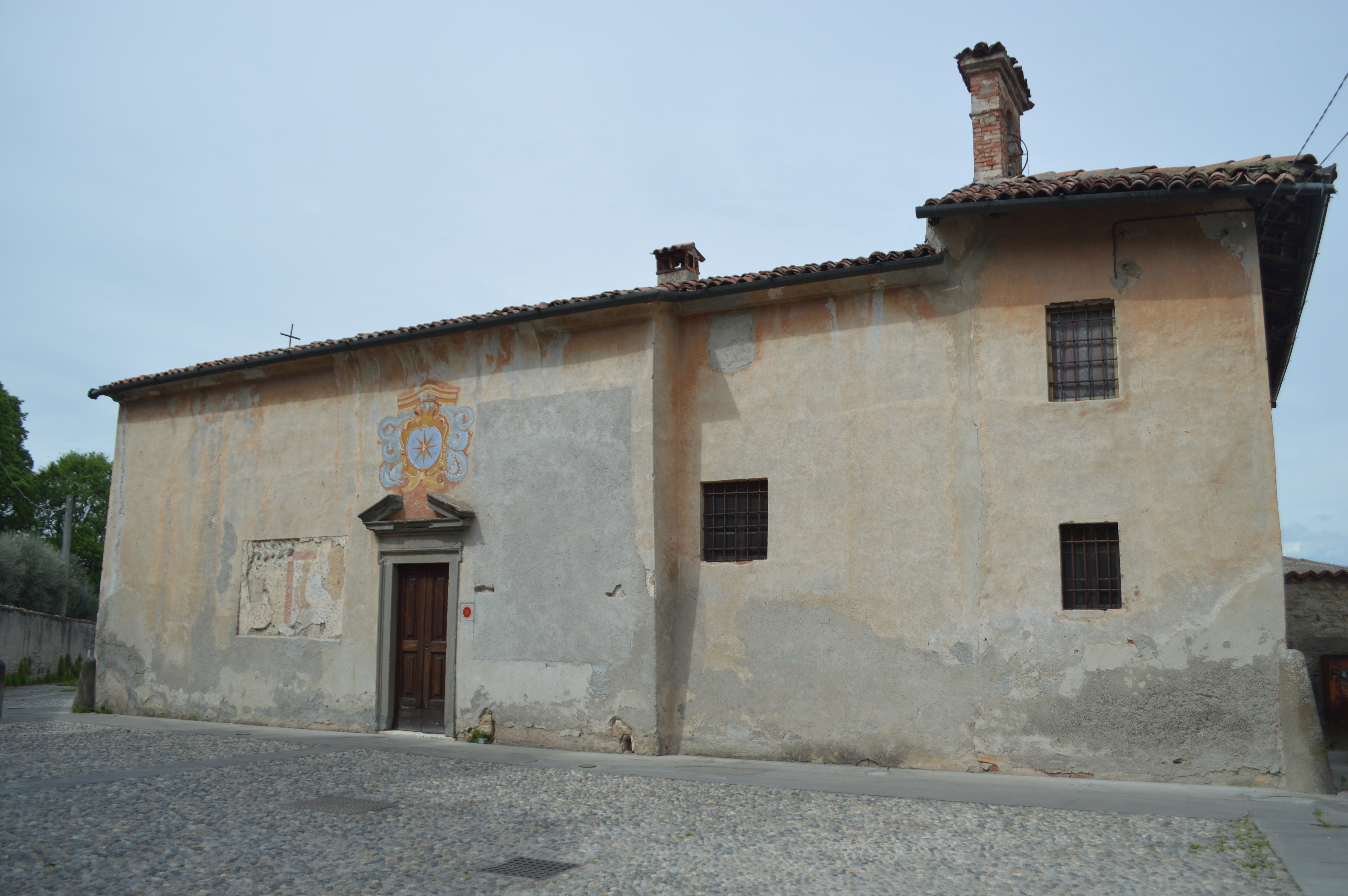 chiesa di santa Giulia a Cazzago San Martino